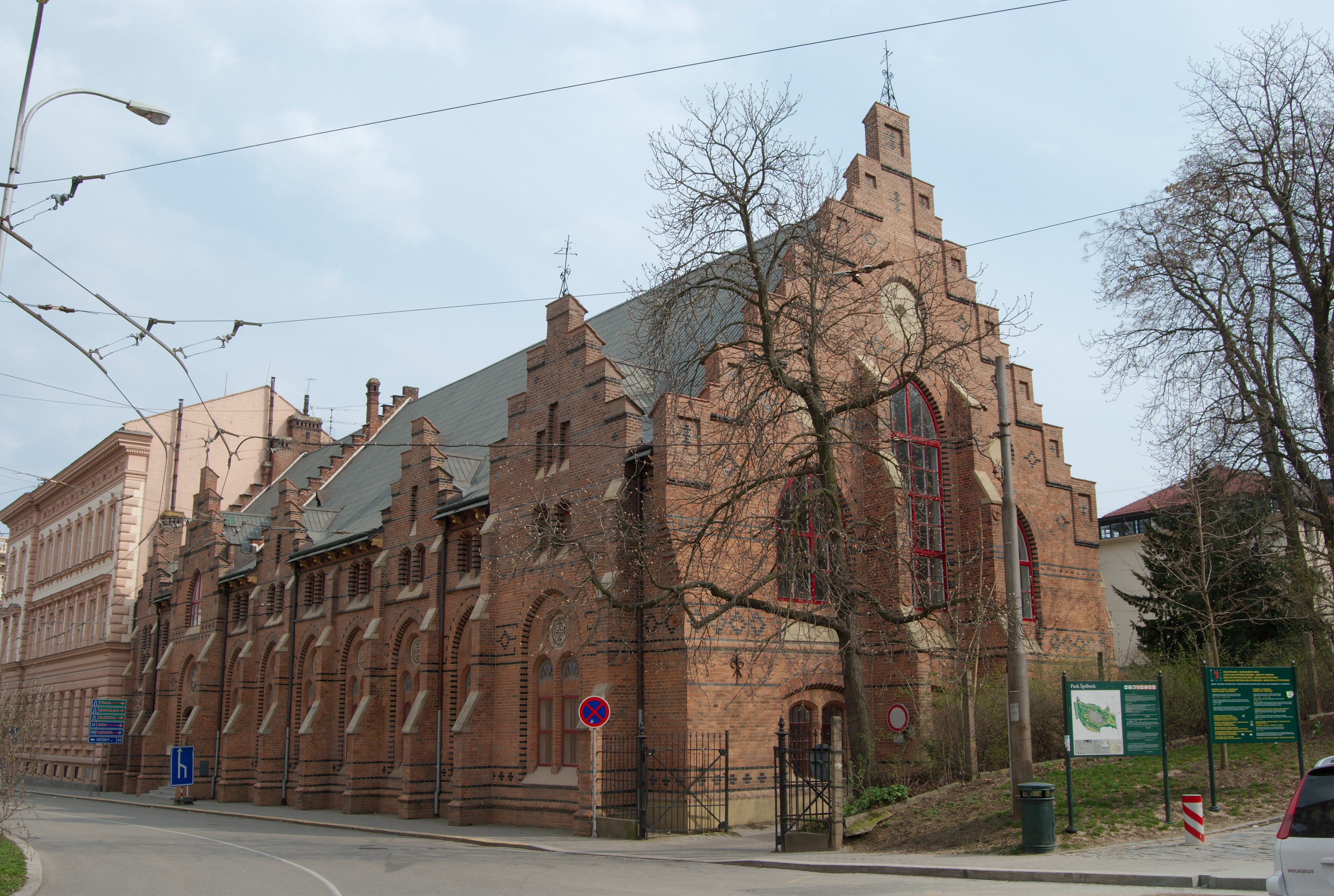 Město Brno - Tělocvična Pod Hradem patřící Masarykově univerzitě